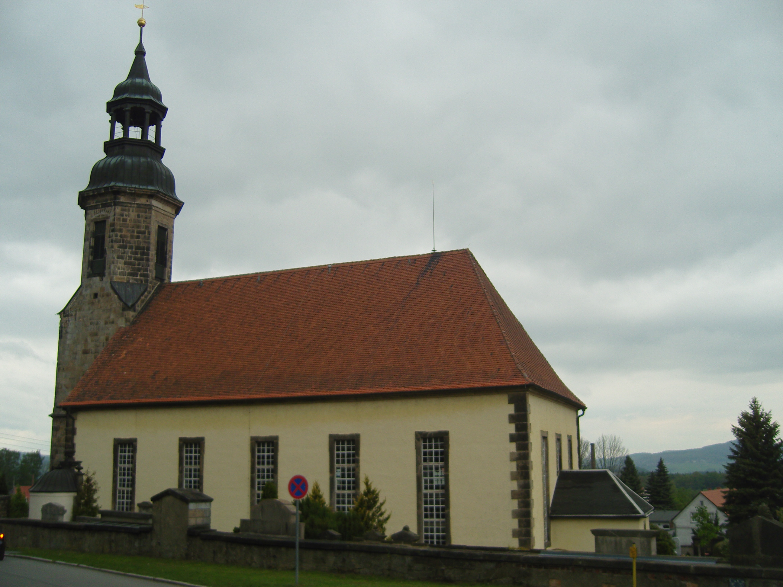 Denkmalgeschütztes Kirche in Waltersdorf; Gemeinde Großschönau